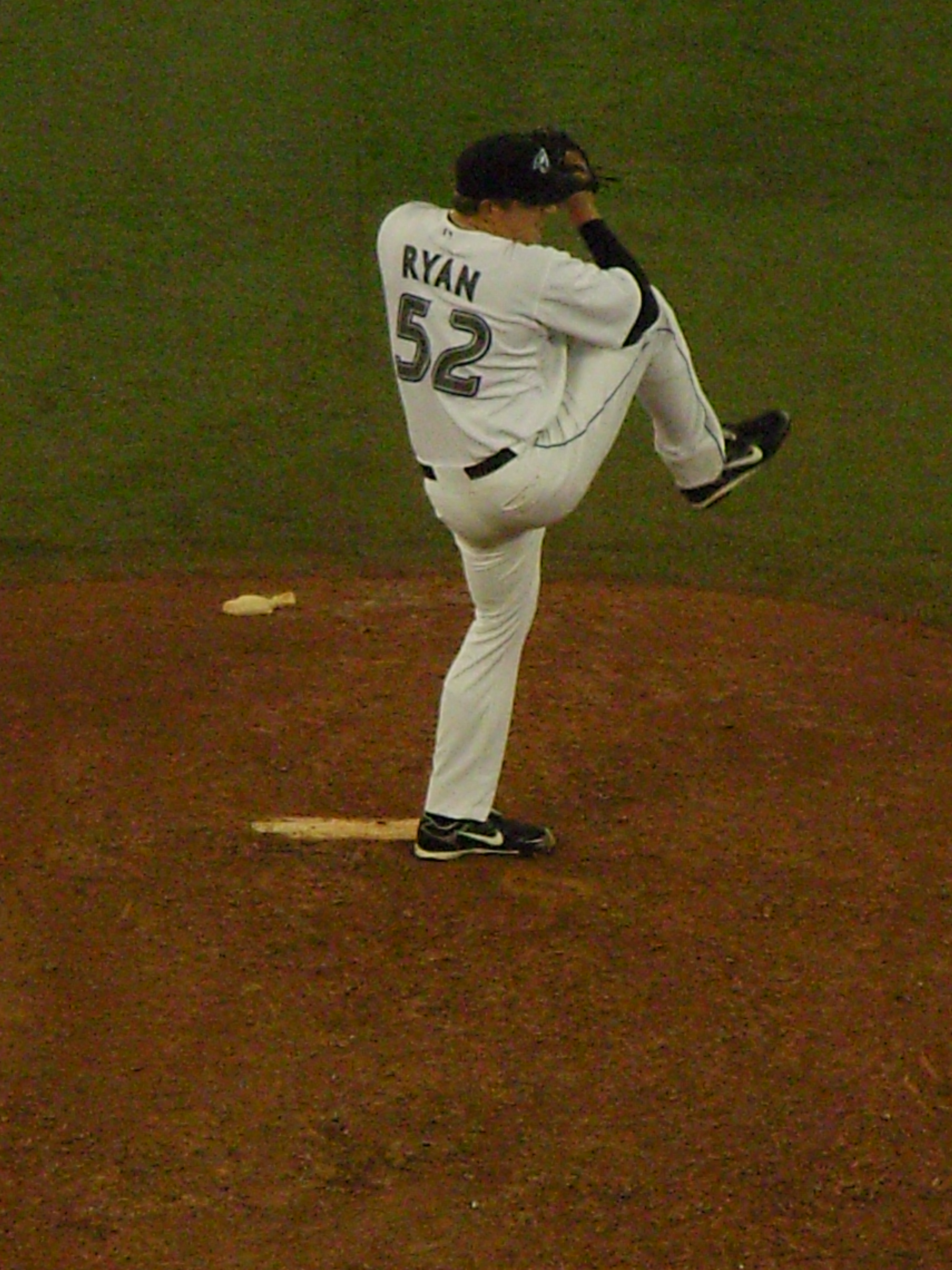 Photo of B. J. Ryan vs. Anaheim Angels, May 22, 2008